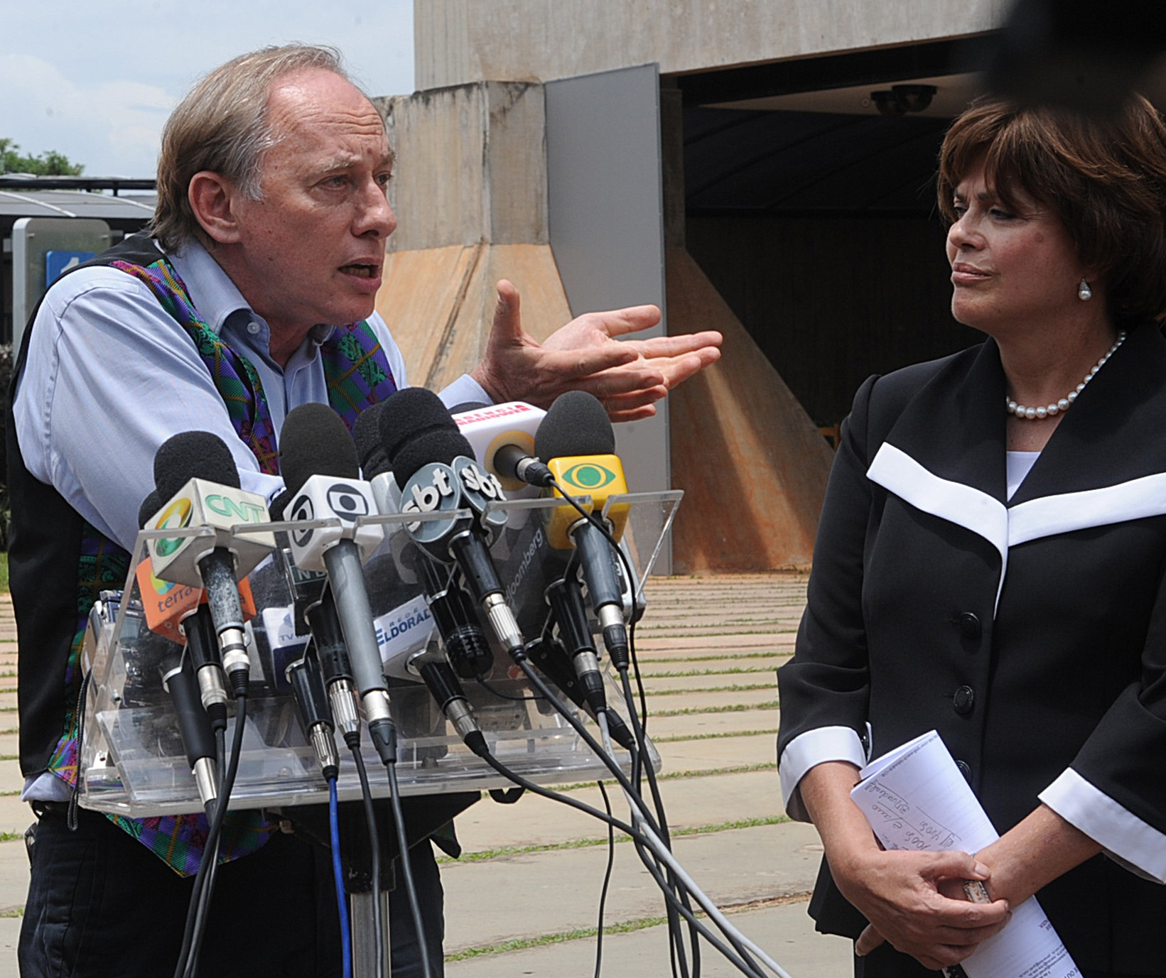 A Chefe da Casa Civil da Presidência da República, Dilma Rousseff e o Ministro do Meio Ambiente, Carlos Minc.